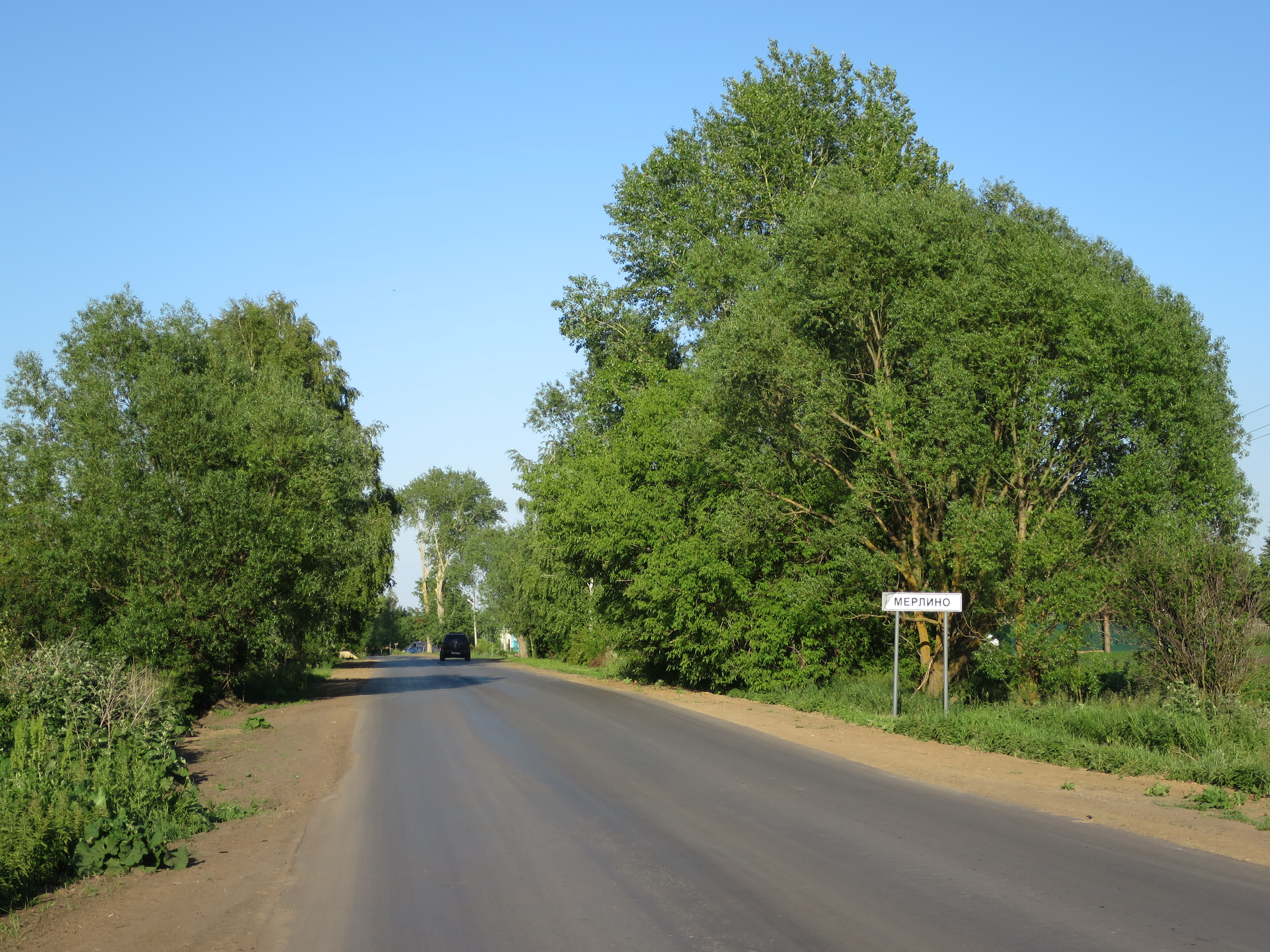 Арзамасский район, Мерлино